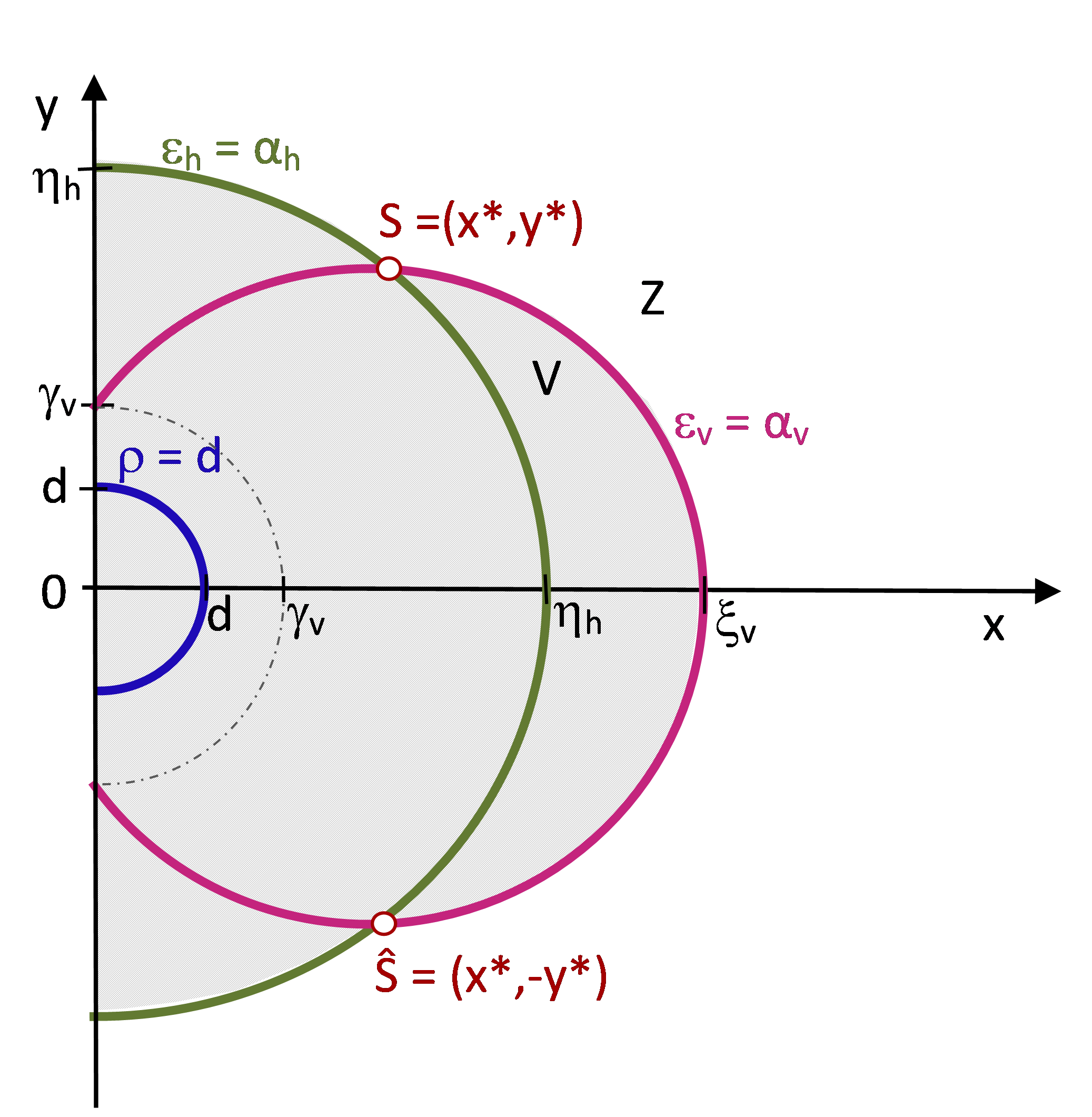 Kamera-Standortverbotszone: Innerhalb dieser Zone ist keine vollständige und scharfe Abbildung des Objekts durch die Kamera möglich